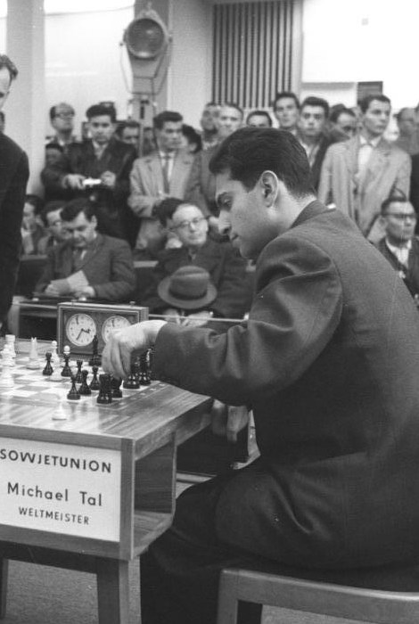 Zentralbild/Kohls/Leske 1.11.1960 XIV. Schacholympiade 1960 in Leipzig Im Ringmessehaus in Leipzig wird vom 16.10. bis 9.11.1960 die XIV. Schacholympiade ausgetragen. Am 28.10.1960 begannen die Kämpfe der Finalrunde.